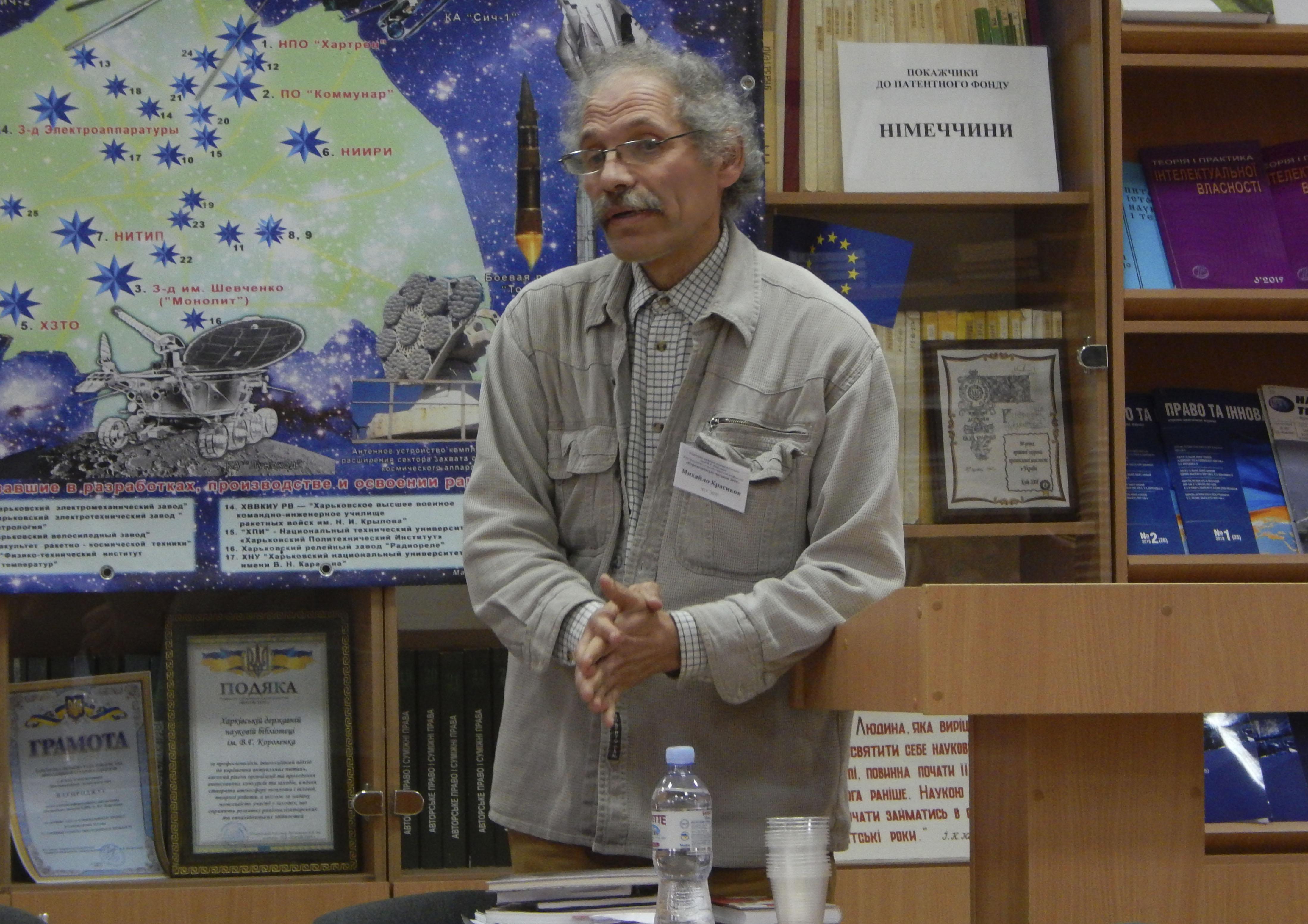 Михайло Михайлович Красіков під час XXII Науково-практична конференція «Короленківські читання». 24 жовтня 2019 Харків. Михайло Михайлович Красіков — професор кафедри українознавства, культурології та історії науки, директор Етнографічного музею «Слобожанські скарби» імені Г. Хоткевича НТУ «ХПІ», кандидат філологічних наук, доцент (Україна, Харків)